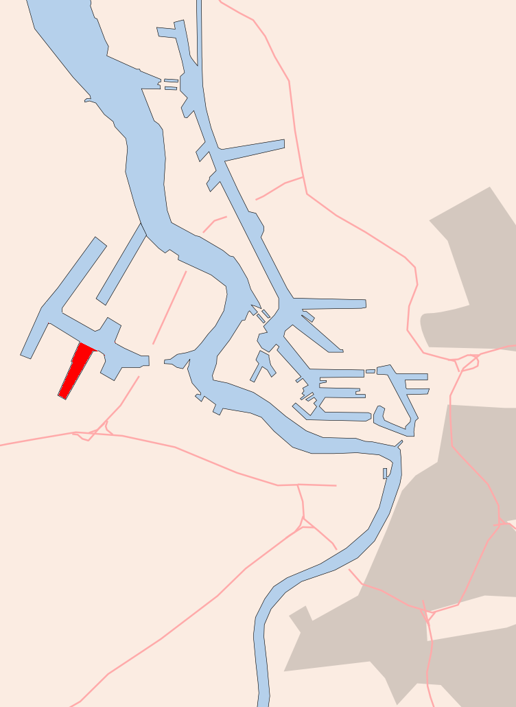 Antwerp , Vrasenedok